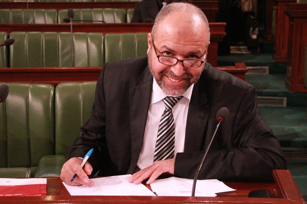 Walid Bennani, membre de l'Assemblée constituante tunisienne